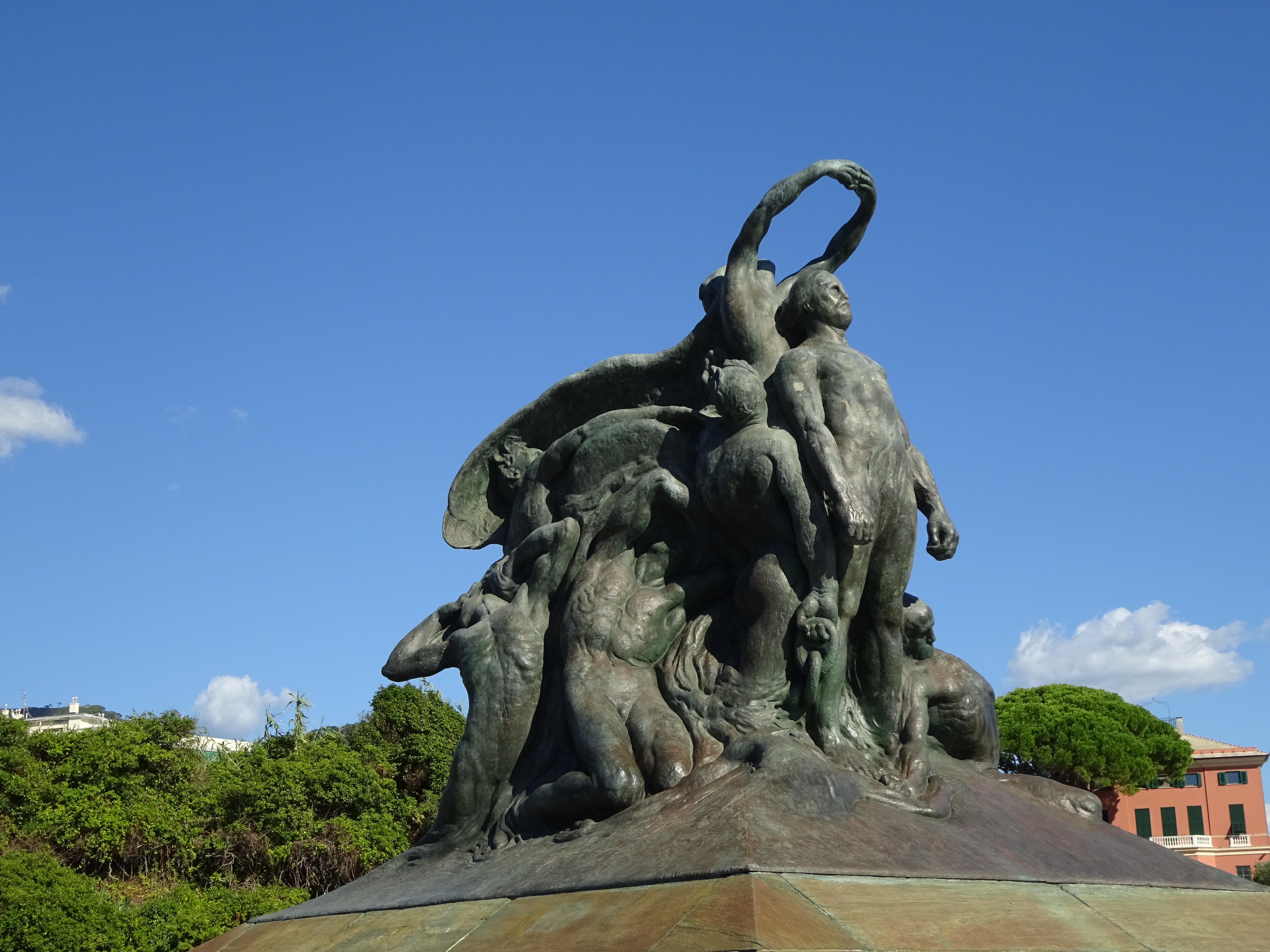 Monumento ai Mille This is a photo of a monument which is part of cultural heritage of Italy.